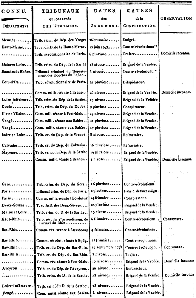 Liste générale des individus condamnés par jugemens, ou mis hors de la Loi par Décrets, et dont les Biens ont été déclarés confisqués au profit de la République. Le département de la Vendée est renommé département "Vengé".